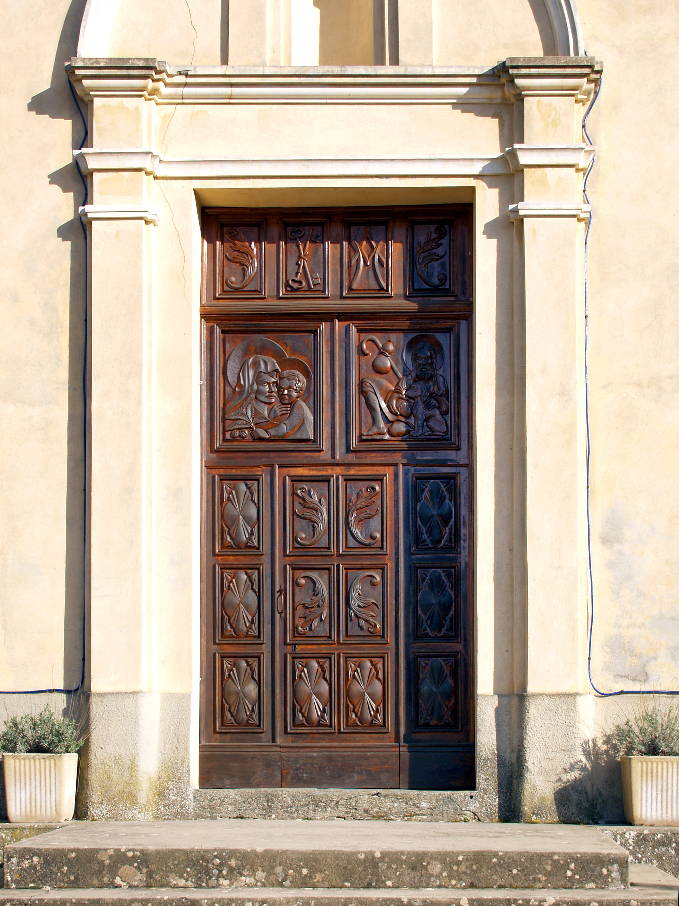 Croce, Castagniccia (Corse) - Portail de l'église paroissiale Saint-Césaire